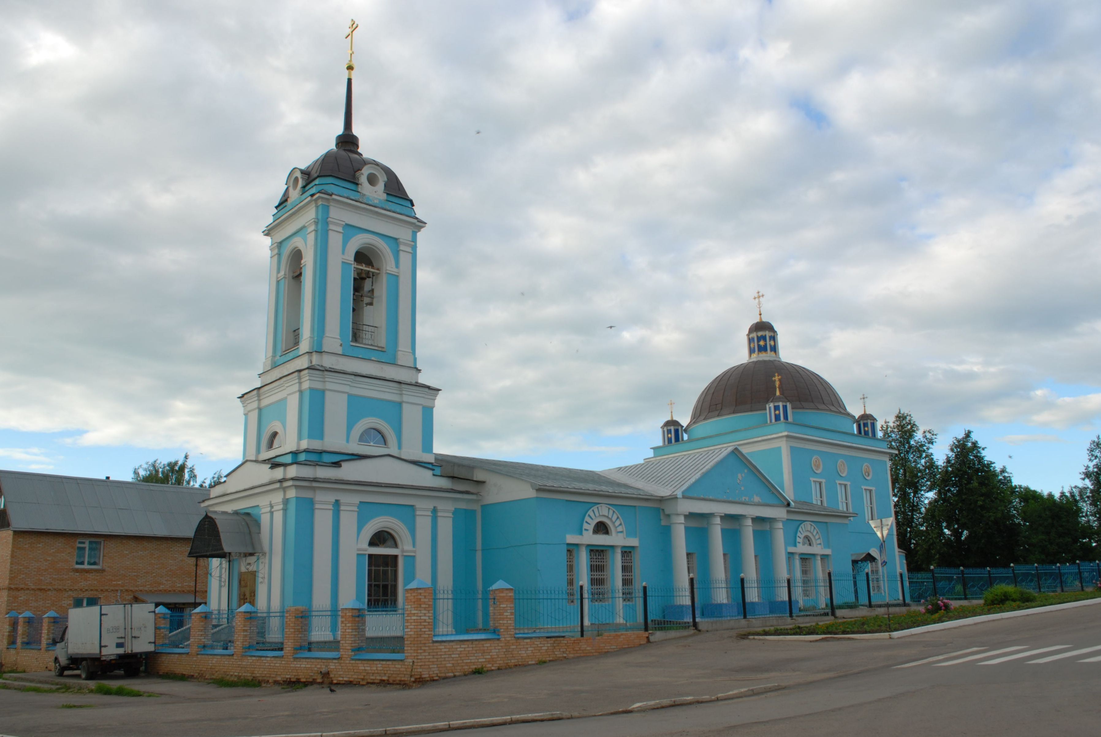 Церковь Смоленская (Калужская область, Сухиничи, город Сухиничи)